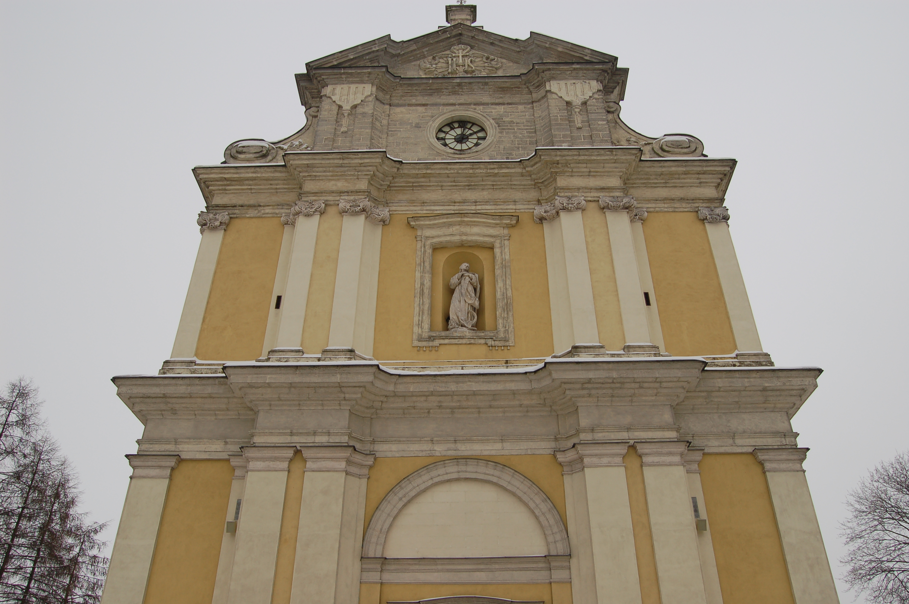 Chmielnik, kościół par. pw. Niepokalanego Poczęcia NMP, lata 1730-1783, 1892, XX w.